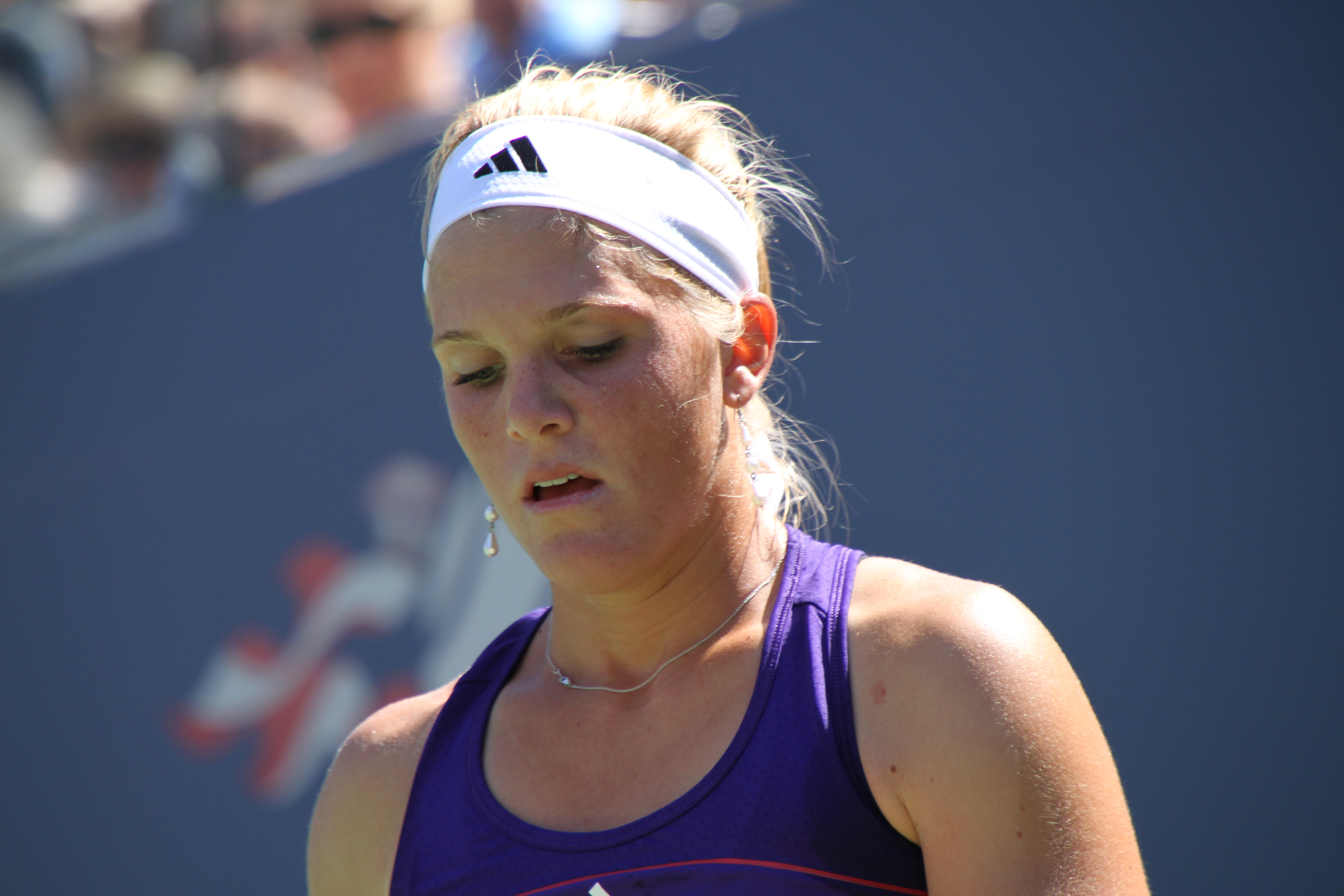 Melanie Oudin